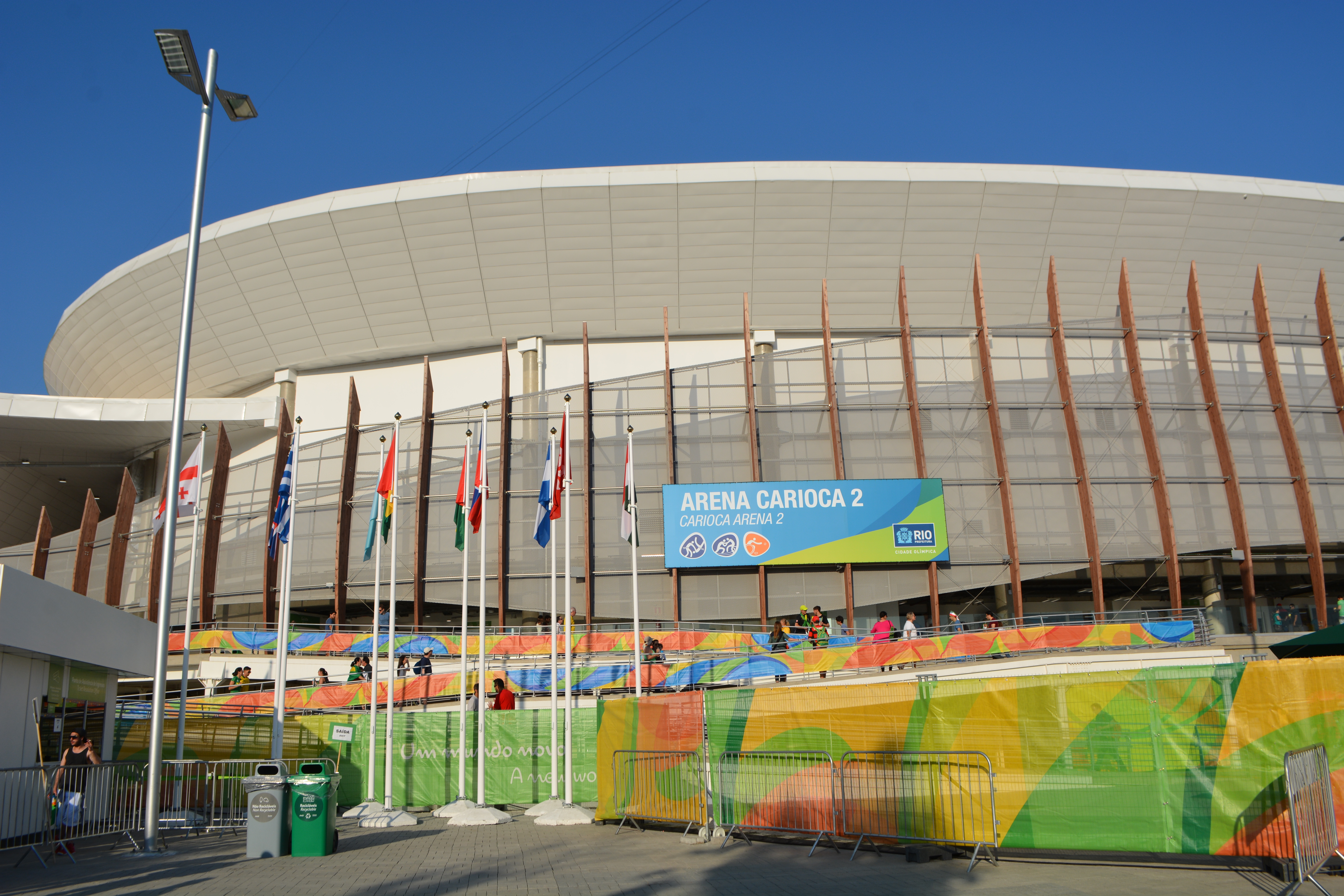 Arena Carioca 2 no Parque Olimpico do Rio de Janeiro